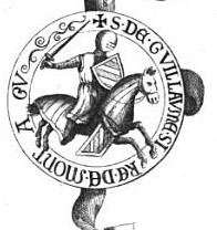 Vilém z MOntgau Seal of William Montagu, 2nd Baron Montagu, inscribed in Latin: S(IGILLUM) DE GUILLAUME SIRE DE MONTAGU ("seal of William, lord of the manor of Montagu"). The arms displayed by the knight are apparently those of Peter de Montfort (died before 4 March 1287) (Bendy of eight or and azure)[1] (son of Peter de Montfort of Beaudesert Castle), the father-in-law of William Montagu, 2nd Baron Montagu. Compare usage in 1301 seal of Guy de Beauchamp, 10th Earl of Warwick (c. 1272 – 12 August 1315) File:GuyDeBeauchamp1301d.jpg displaying Beauchamp and Newburgh arms